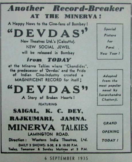 Publicité pour Devdas au Minverva de Bombay, parue dans The Times of India le 6 septembre 1935